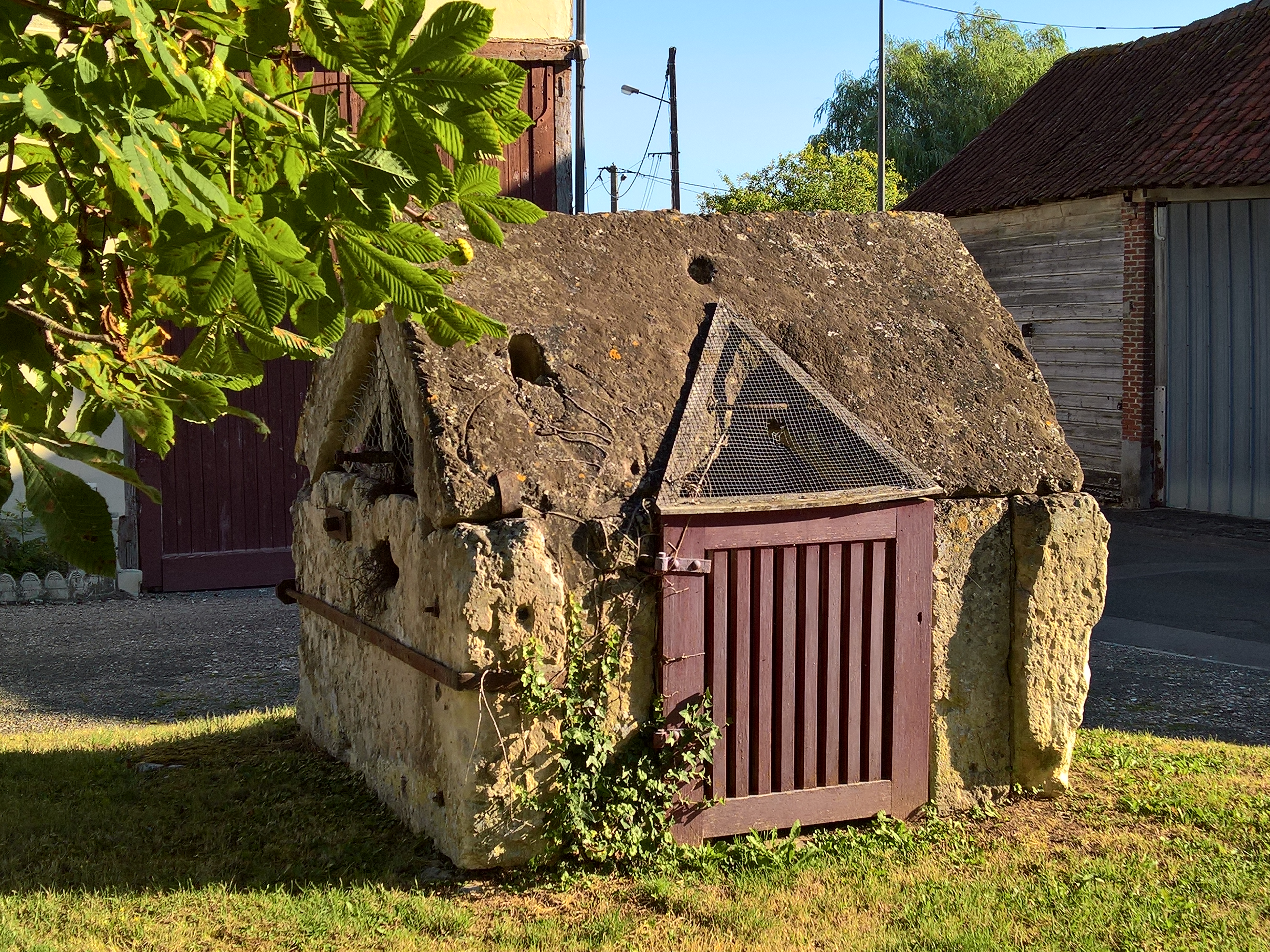 Tilloy-lès-Conty - Puits ancien, place de l'église.